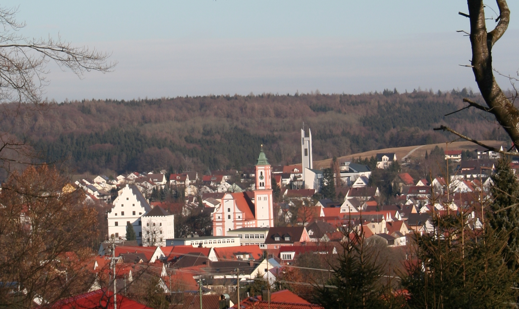 Blick auf Krumbach vom Reschenberg aus